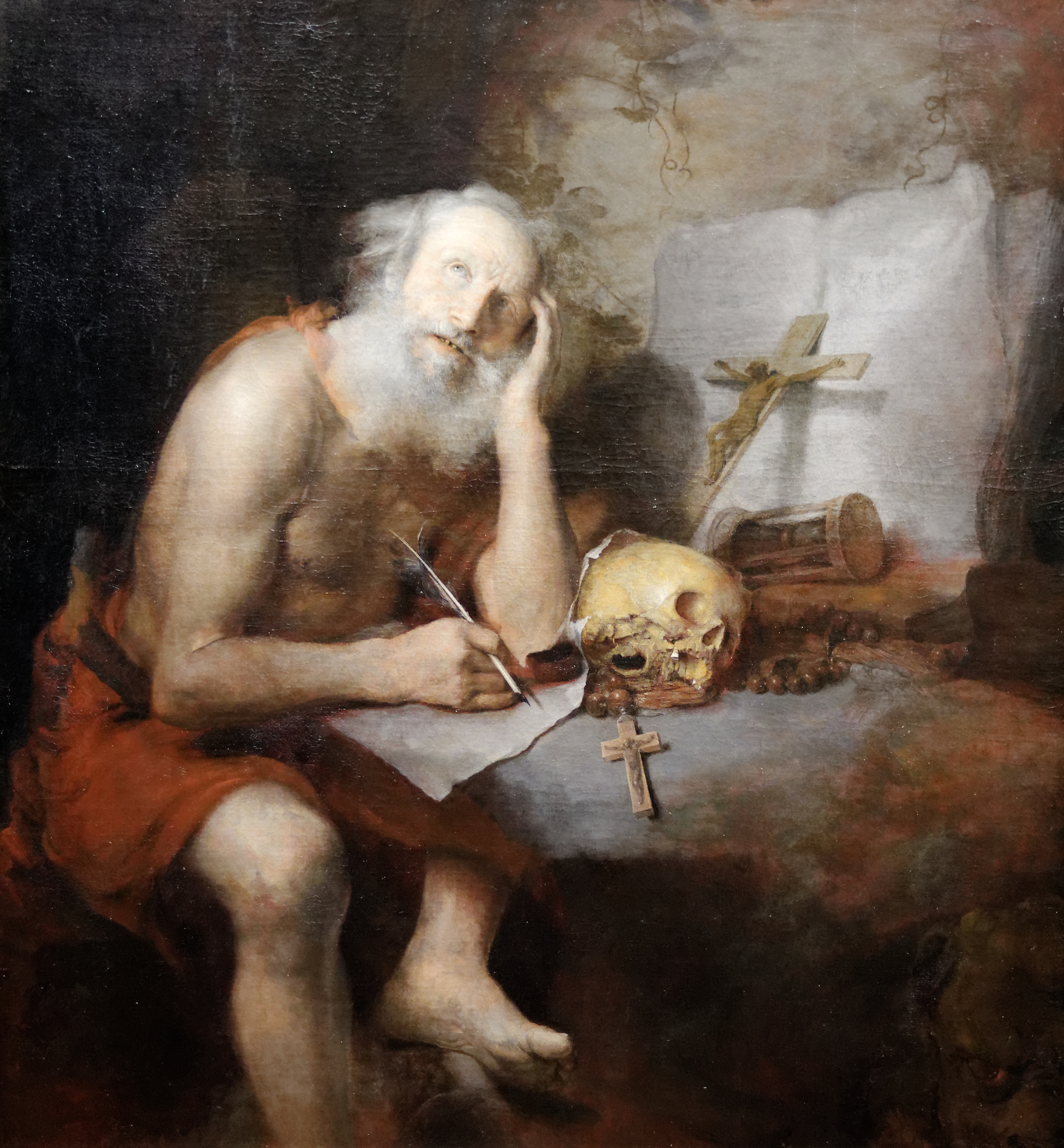 Jérôme de Stridon (Saint Jérôme) par Christoph Paudiss. ca 1656-58. Kunsthistorisches Museum, Vienne (Autriche). Inv Nr GG 395.